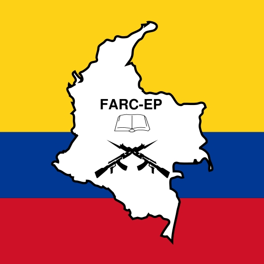 Bandera de las FARC-EP